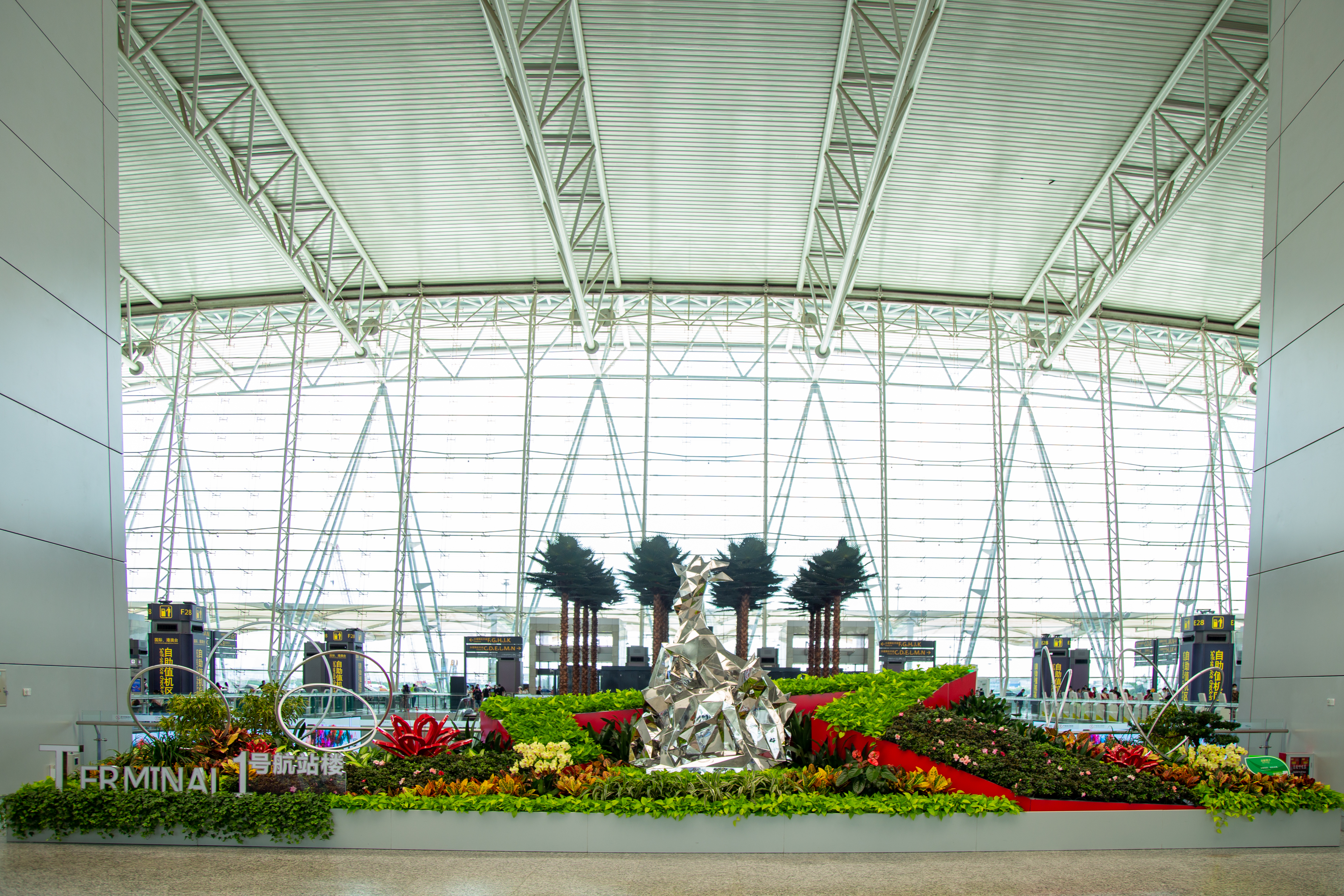 广州白云国际机场一号航站楼出发大厅中庭